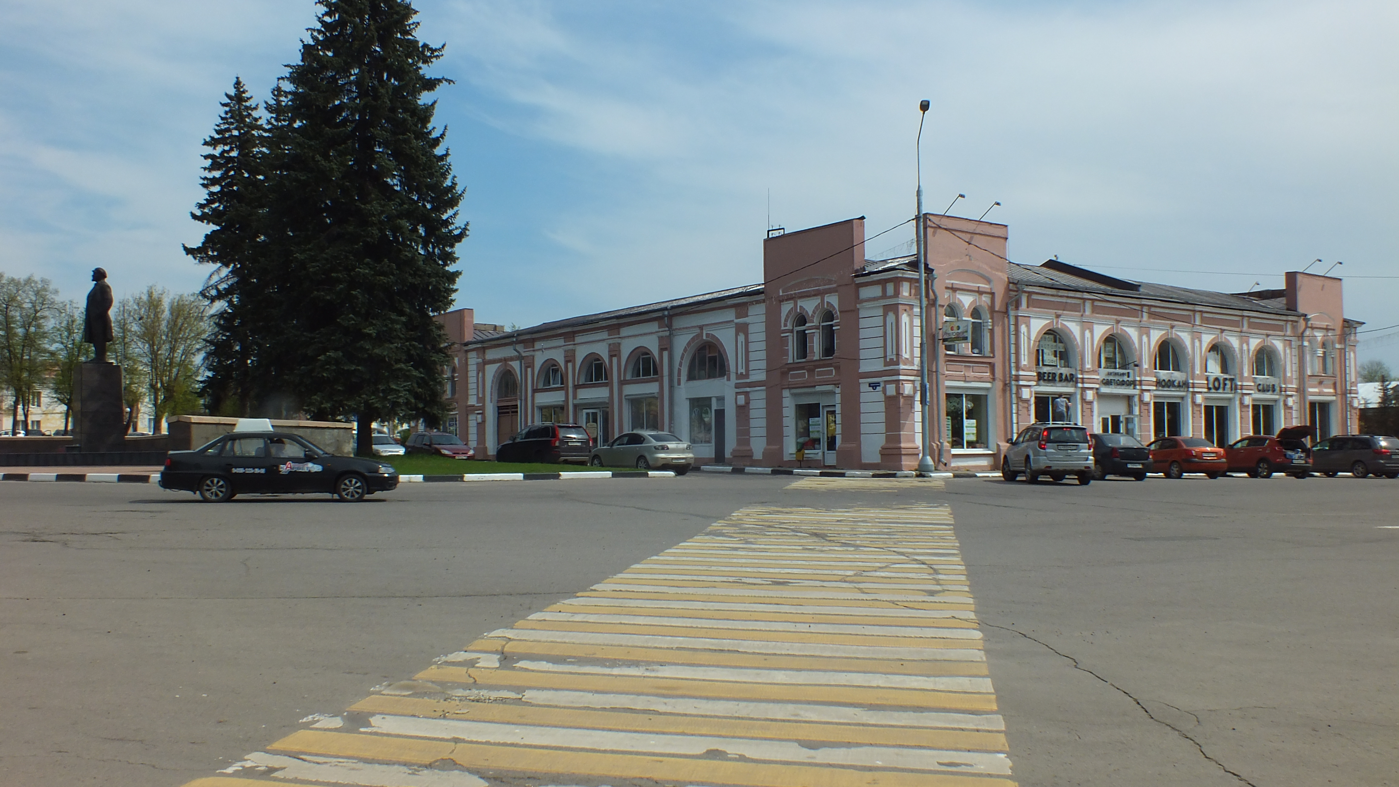 Ансамбль торговой площади: площадь Ленина, Серпухов, Московская область